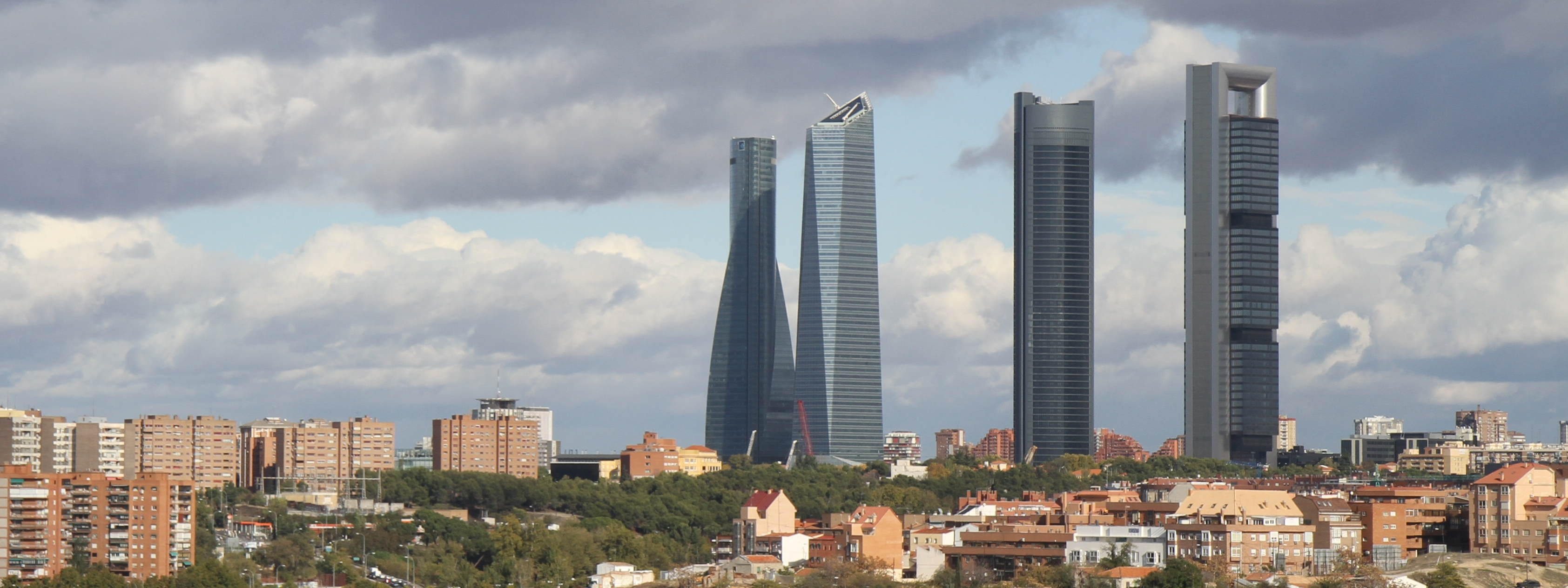 Torres de Madrid.